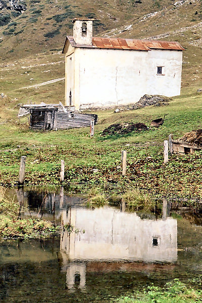 Kapelle des Heiligen Roccus in Val Faller